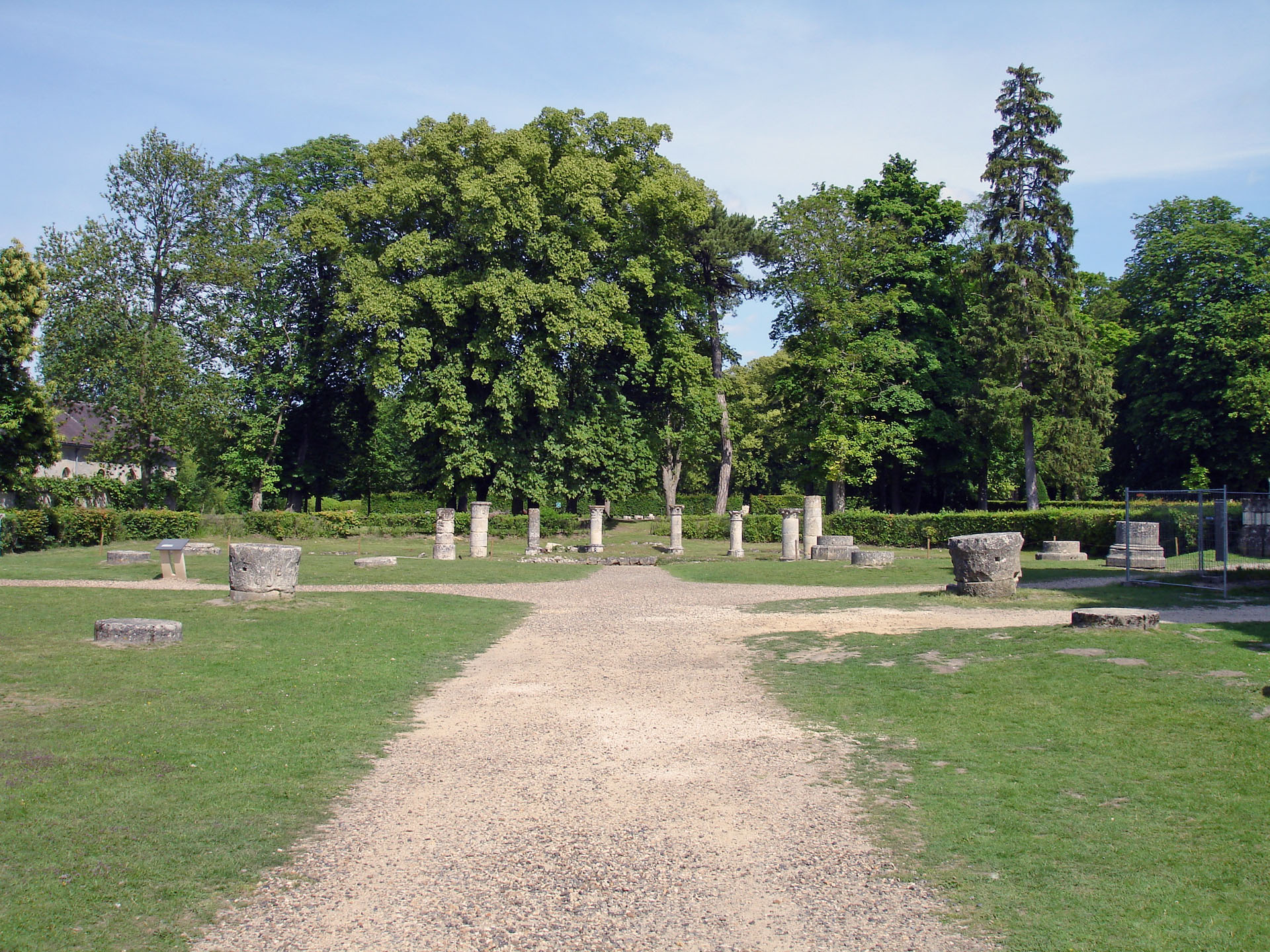 Axe de la nef de l'église abbatiale de l'abbaye de Royaumont, Val-d'Oise, France.